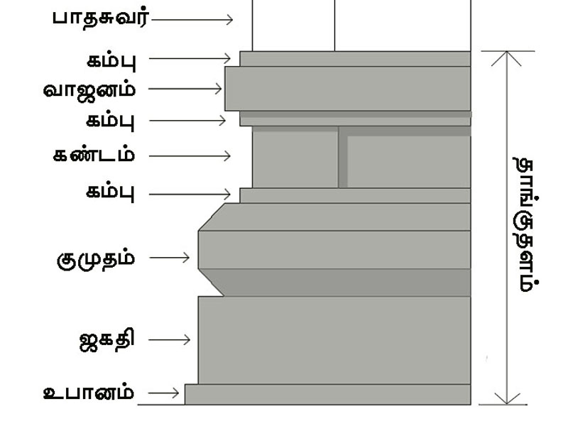 Drawn by the user:Mayooranathan